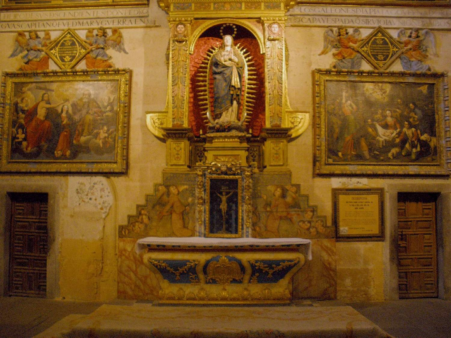 Chapel of the Concepción, Segovia Cathedral